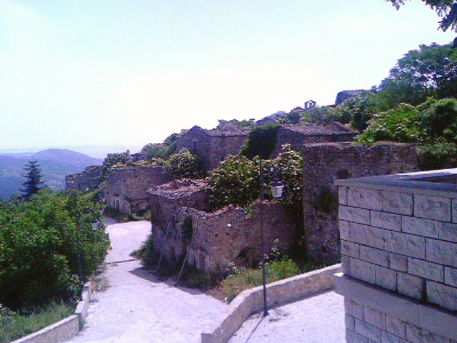 Rione Fossi, panorama. Accadia (FG) - Accadia